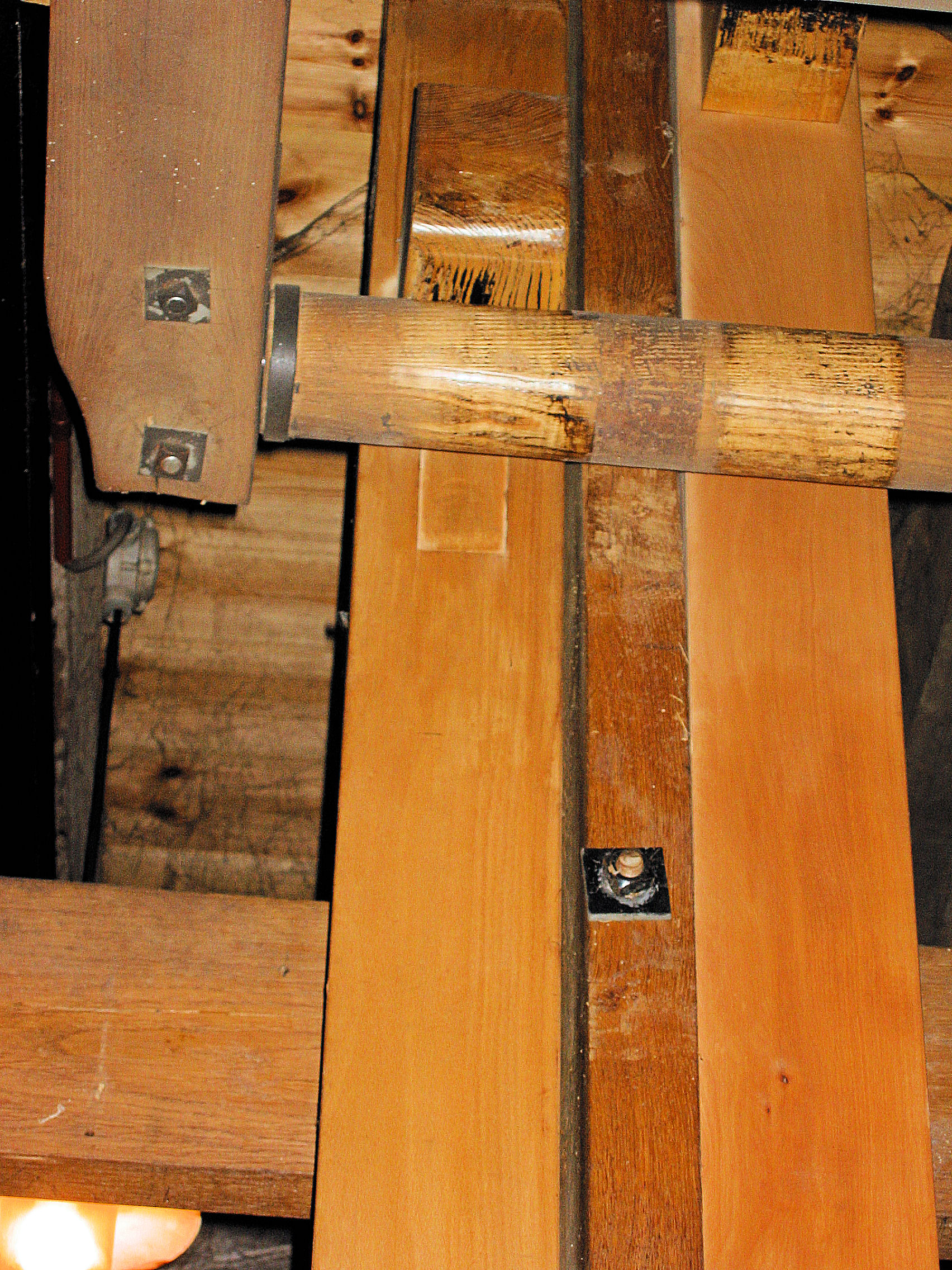 Holten's Molen spaak met slaghei en loshei, Deurne, the Netherlands